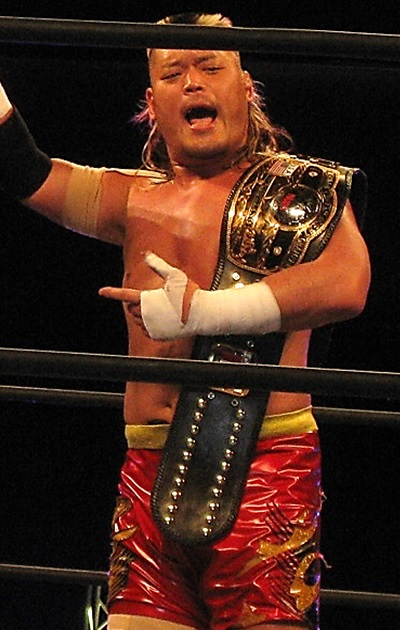 2015年3月22日 ベイコム総合体育館「Road to INVASION ATTACK 2015」天山広吉